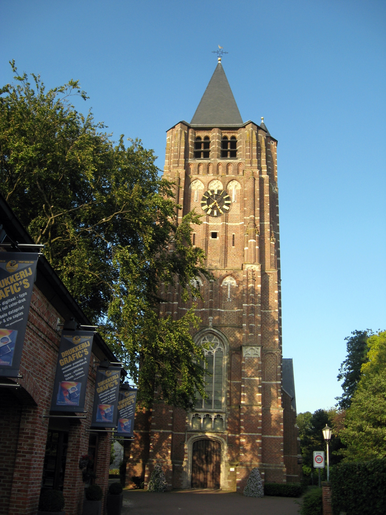 Parochiekerk Sint-Michiel in Weelde